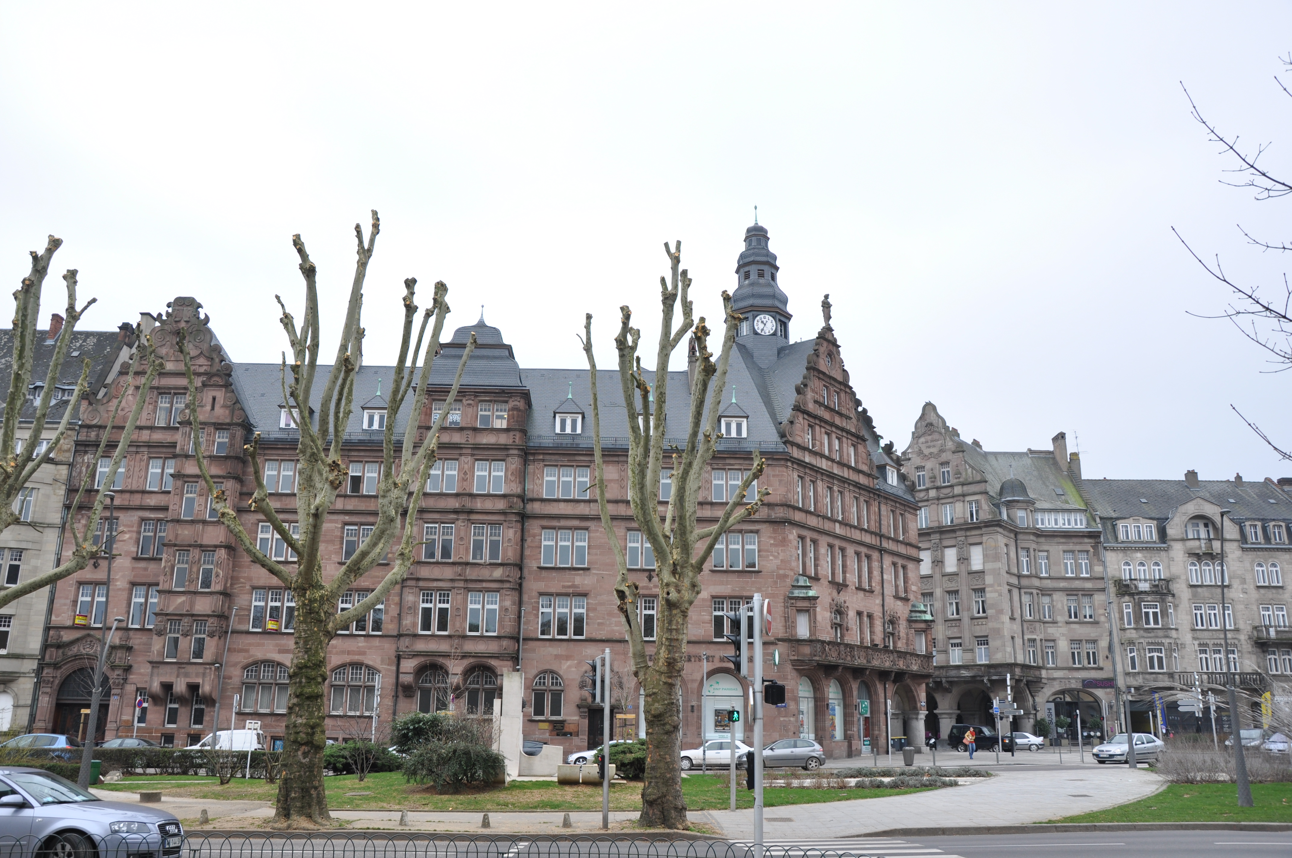 3 Avenue Foch, Metz, Lorraine, France